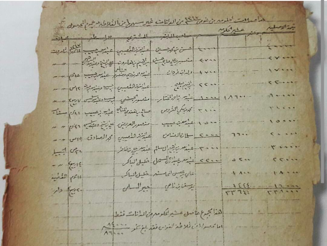 وثيقة حجازية من ارشيف الحكومة السعودية تبين مبيعات اللؤلؤ و يضهر فيها اسم خليل بن ابراهيم الباكر مرتين